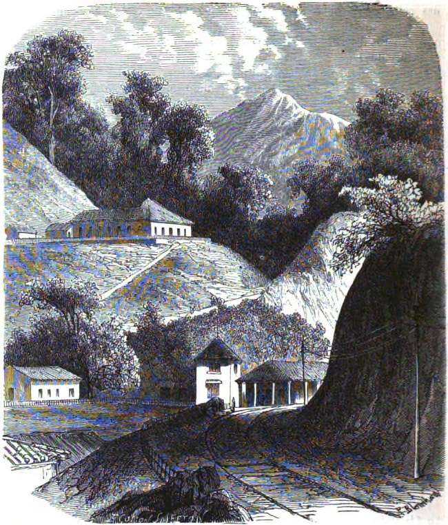 Chemin de Fer D. Pedro II. — D'après le croquis de M. Vleminex. Station de Rodeio.